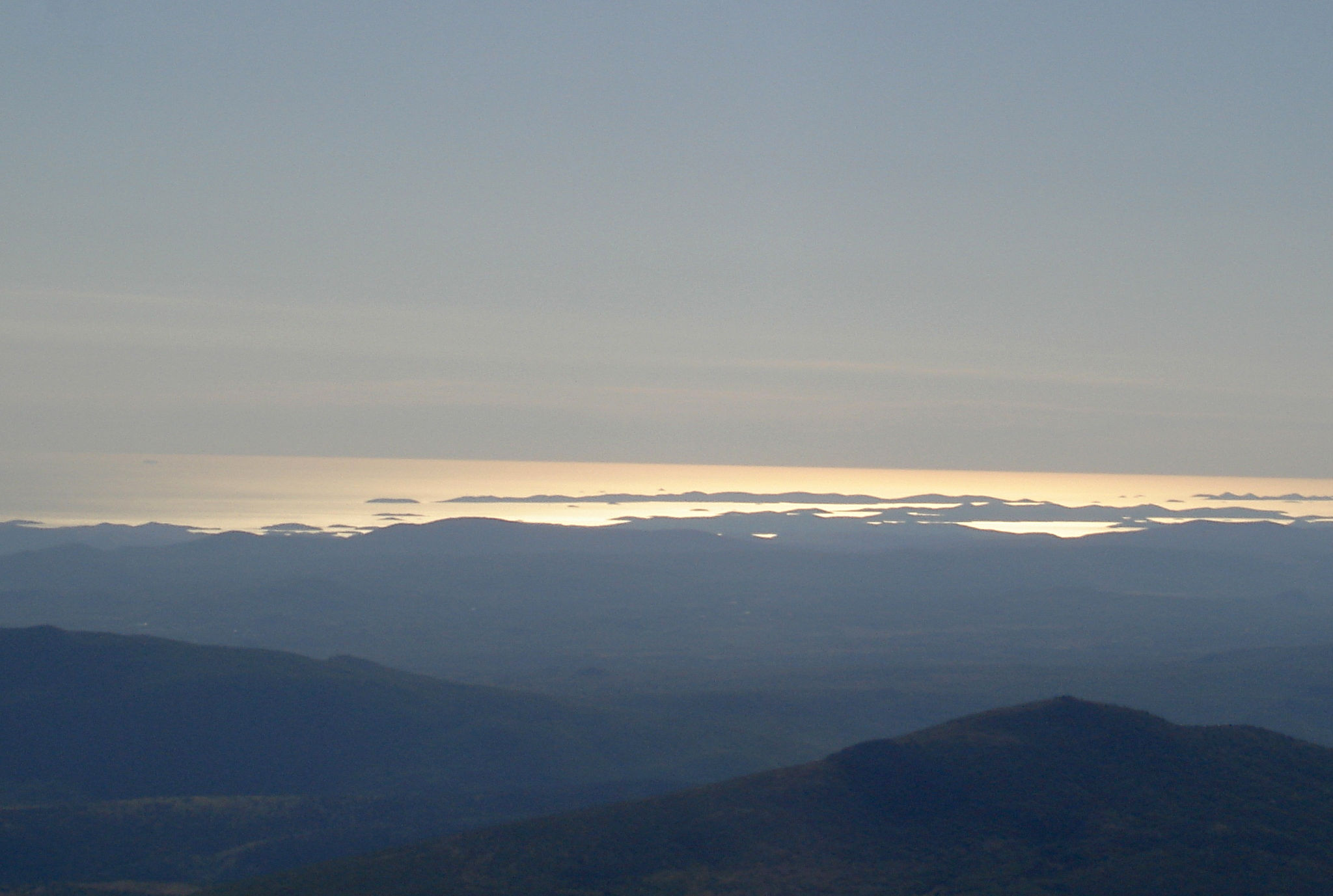 Pogled sa Svilaje jugozapadno prema otocima Jadranskog mora.